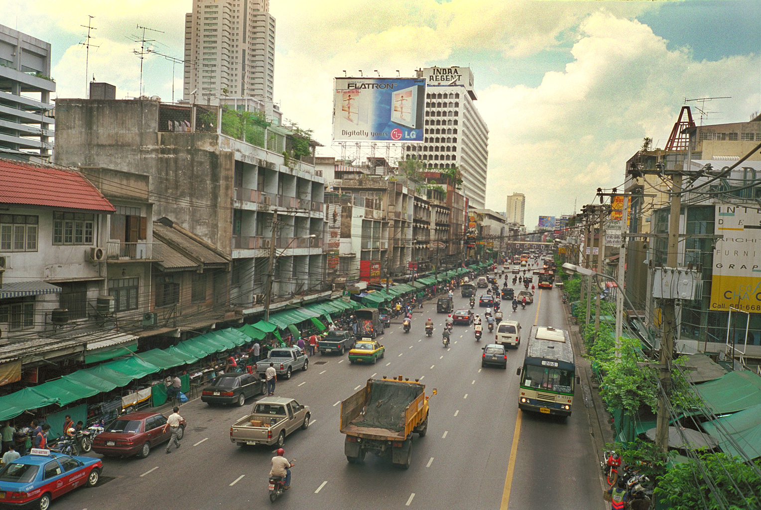 Ratcha Prarop Road, Pratunam, Bangkok, Thailand.